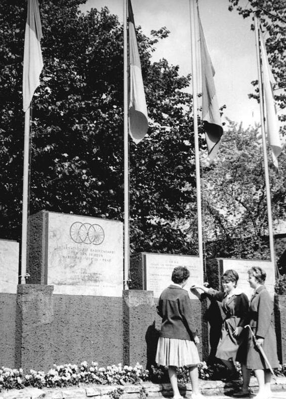 Zentralbild-Schaar Tre-Qu 6.5.1961 Friedensfahrt-Vorbereitungen aus dem Etappenort Leipzig UBz. In Leipzig wurde ein Friedensfahrt-Denkmal gebaut. Die jeweiligen Namen der Sieger der Etappe nach Leipzig werden hier eingemeißelt.